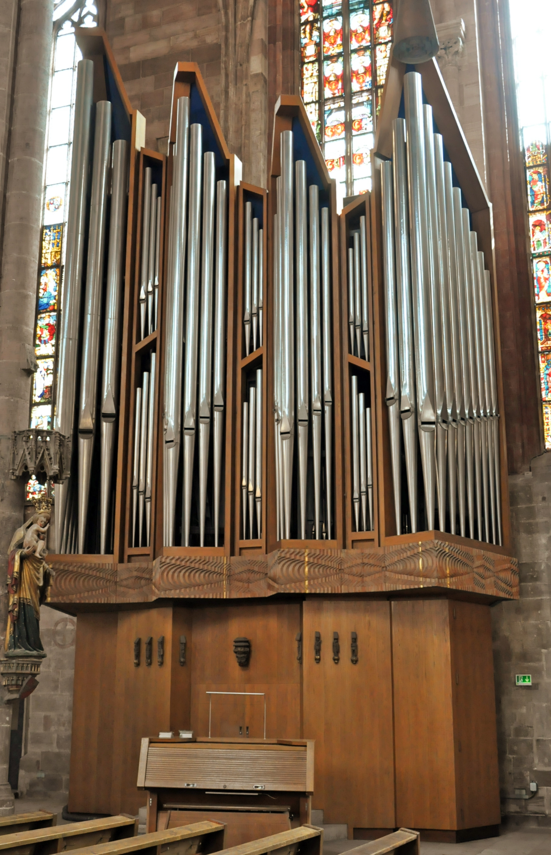 Orgel in St. Sebald Nürnberg